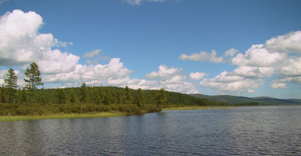 Горное озеро Таглей. Забайкалье, Бурятия, Джидинский район, этнопоселение Улзар.